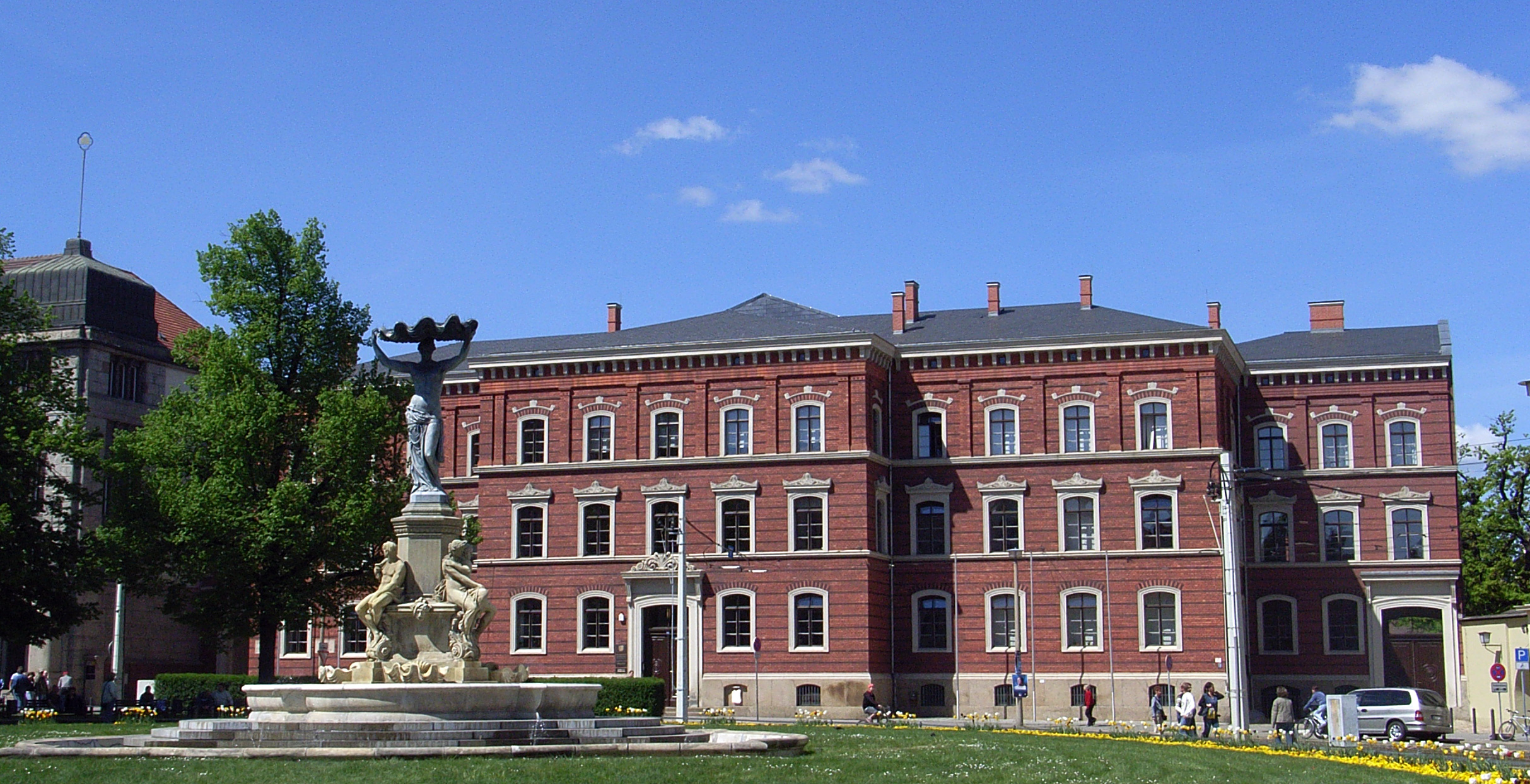 Muschelminna und Gericht